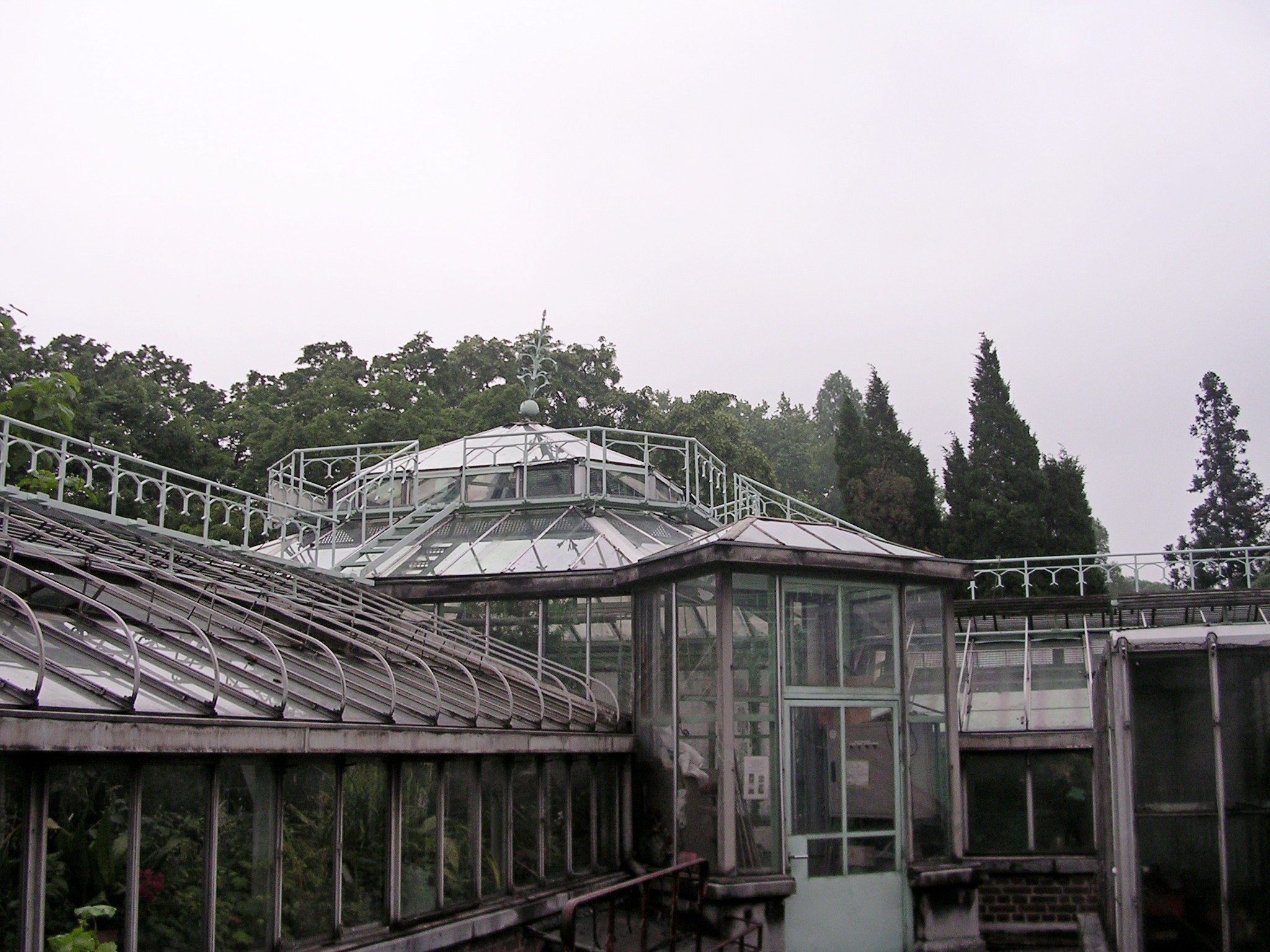 Les serres du jardin botanique - toiture de style victorien